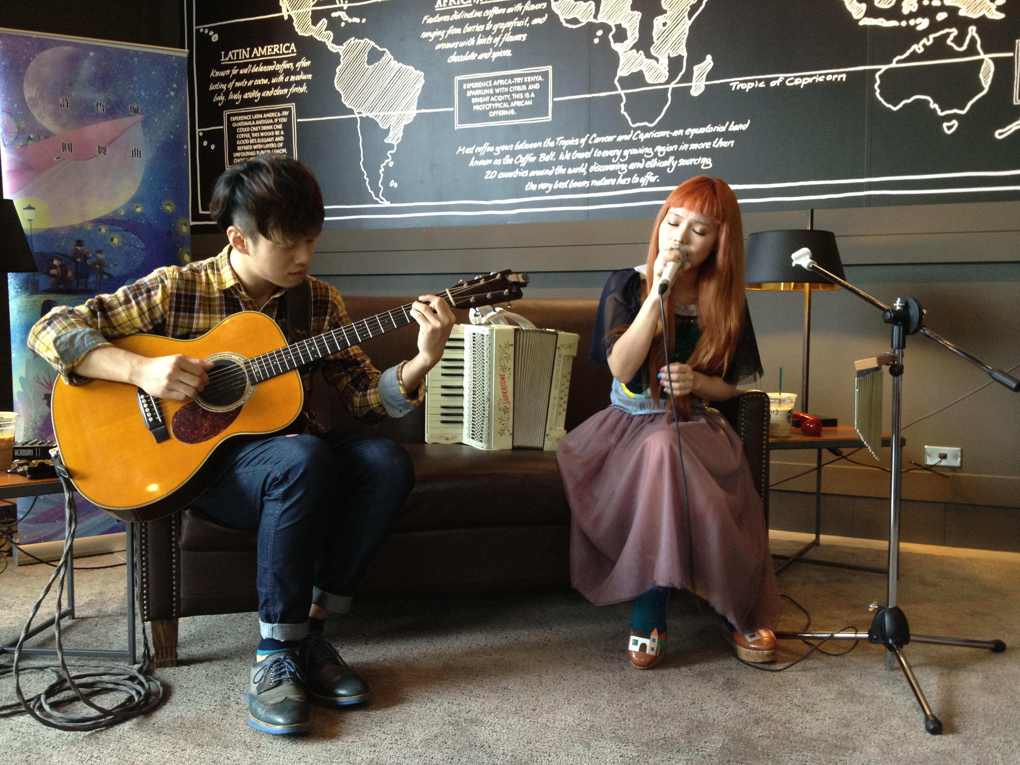 2014年6月7日，許哲珮（右）於星巴克左營店進行「圓舞曲」專輯咖啡時光巡迴演出。